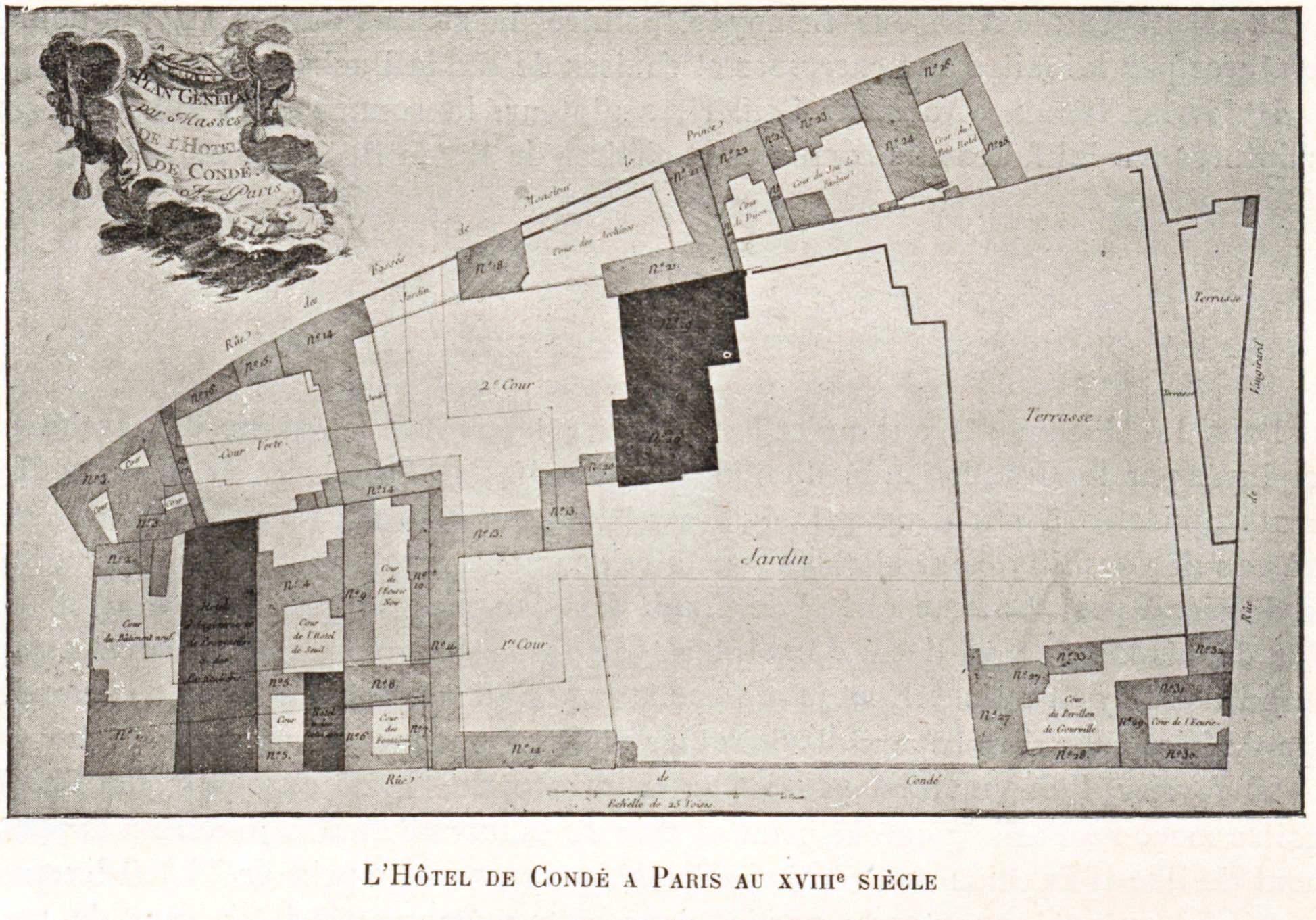 Plan de l'hôtel de Condé au Template:S-.